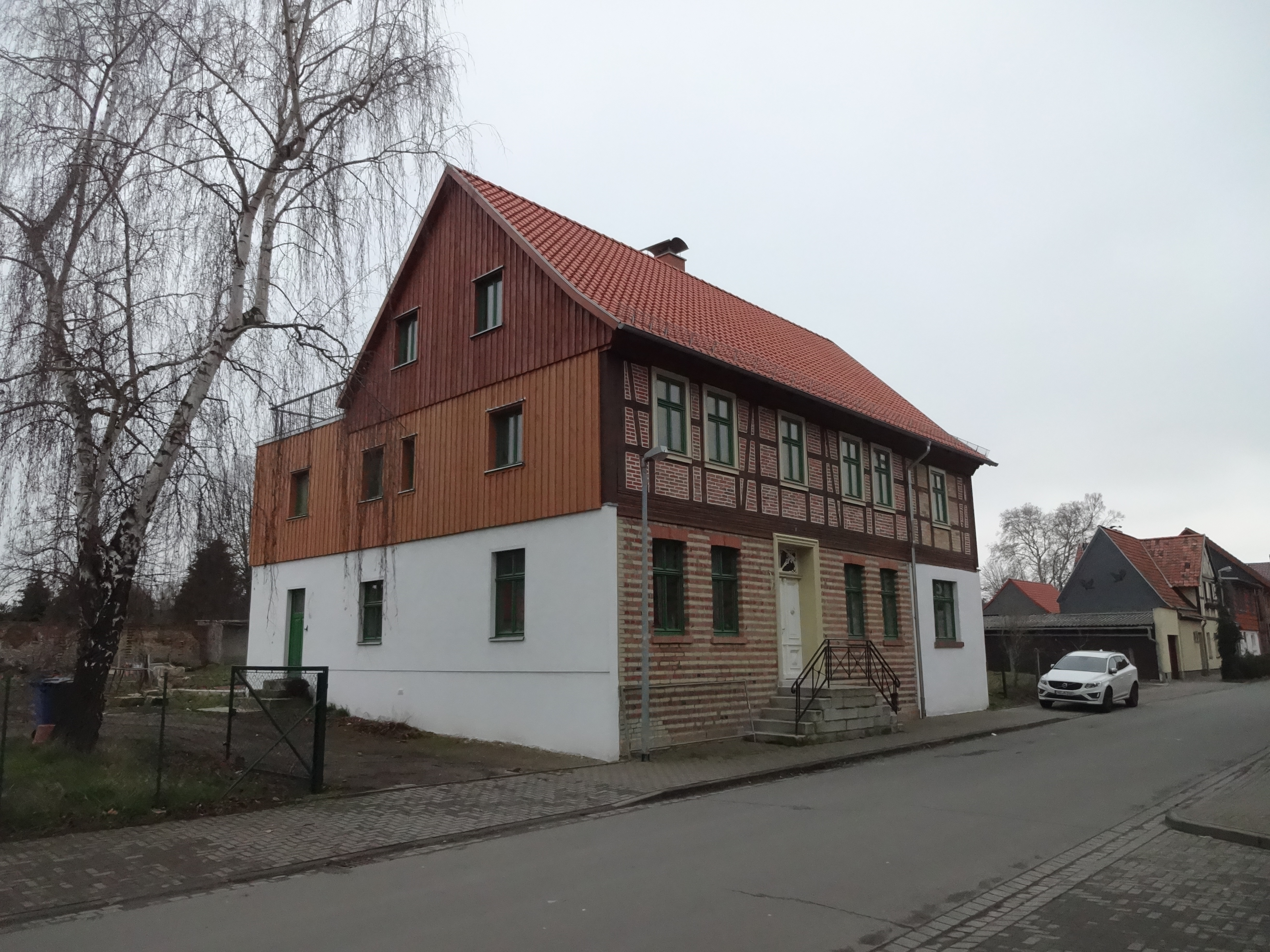 denkmalgeschütztes Wohnhaus in der Minslebener Straße 1 in Derenburg